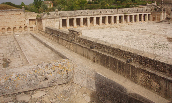 Fuente Grande. Ocaña. Toledo. Castilla La Mancha. España Vuela hasta este sitio / Fly to this location (Precisa / requires Google Earth)